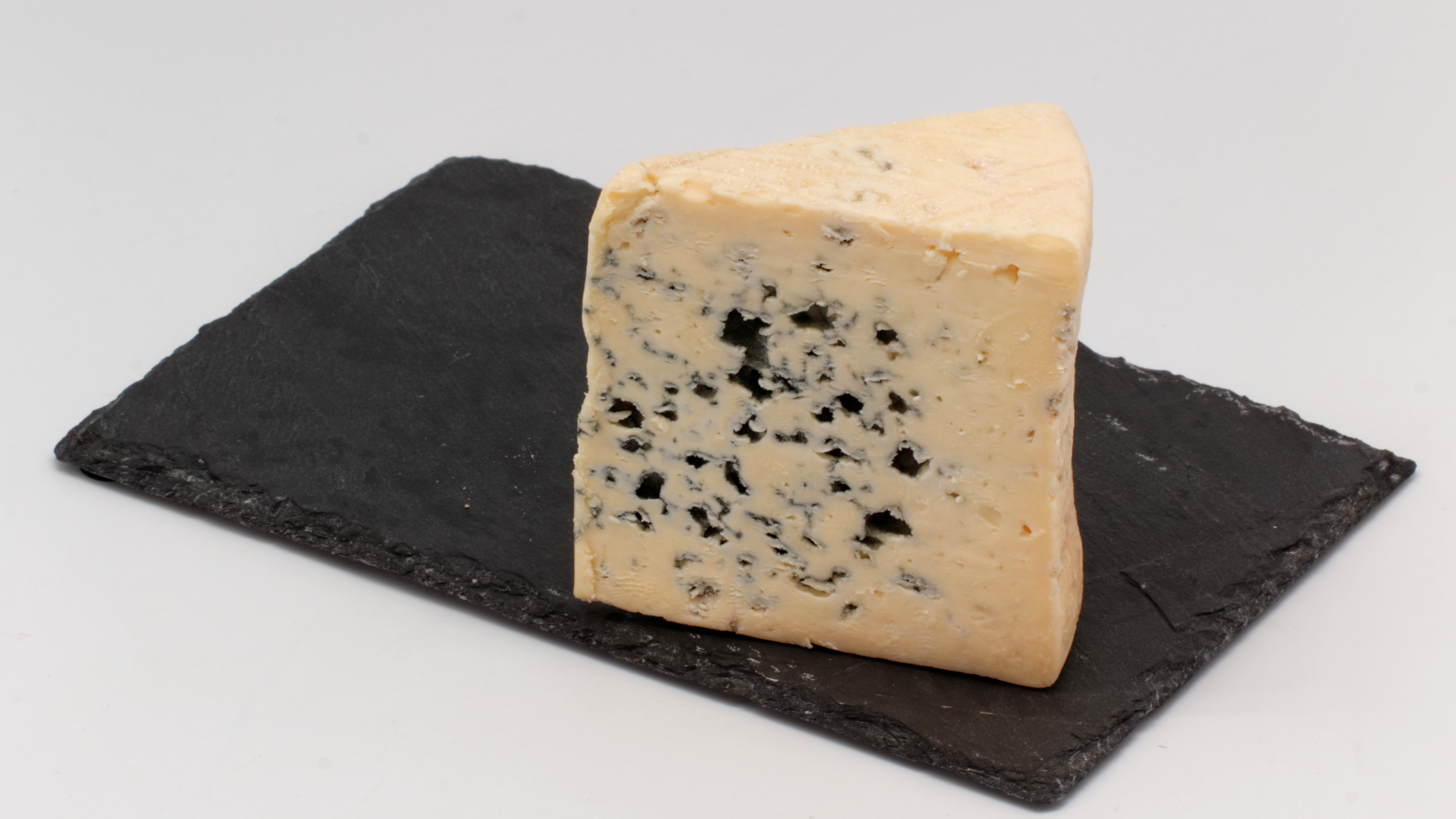 Bleu des Causses ; Androuet 17e